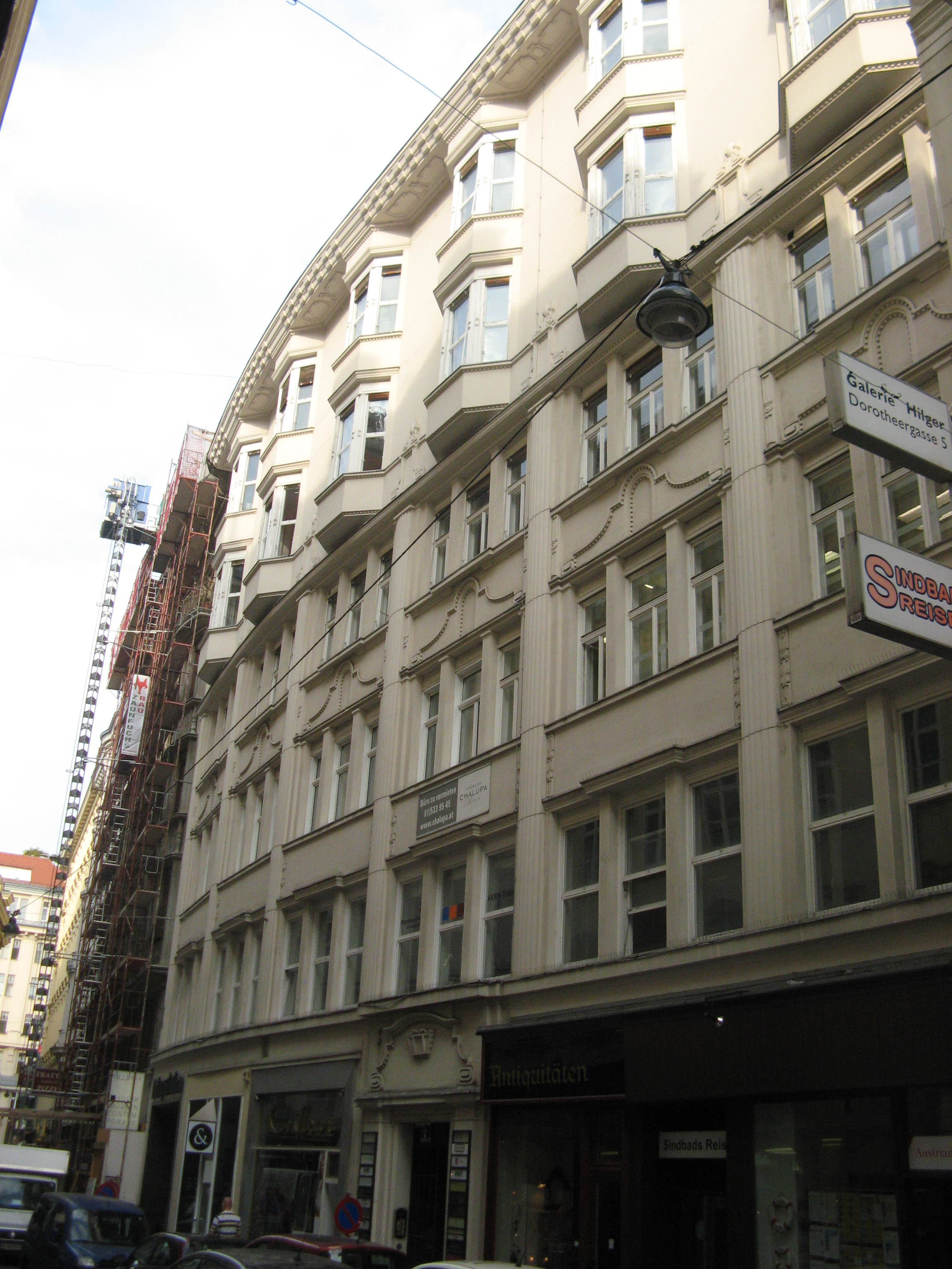 Westermannhaus (1912-15) von Emil Hoppe, Otto Schönthal und Marcel Kammerer, Dorotheergasse 7, Wien-Innere Stadt